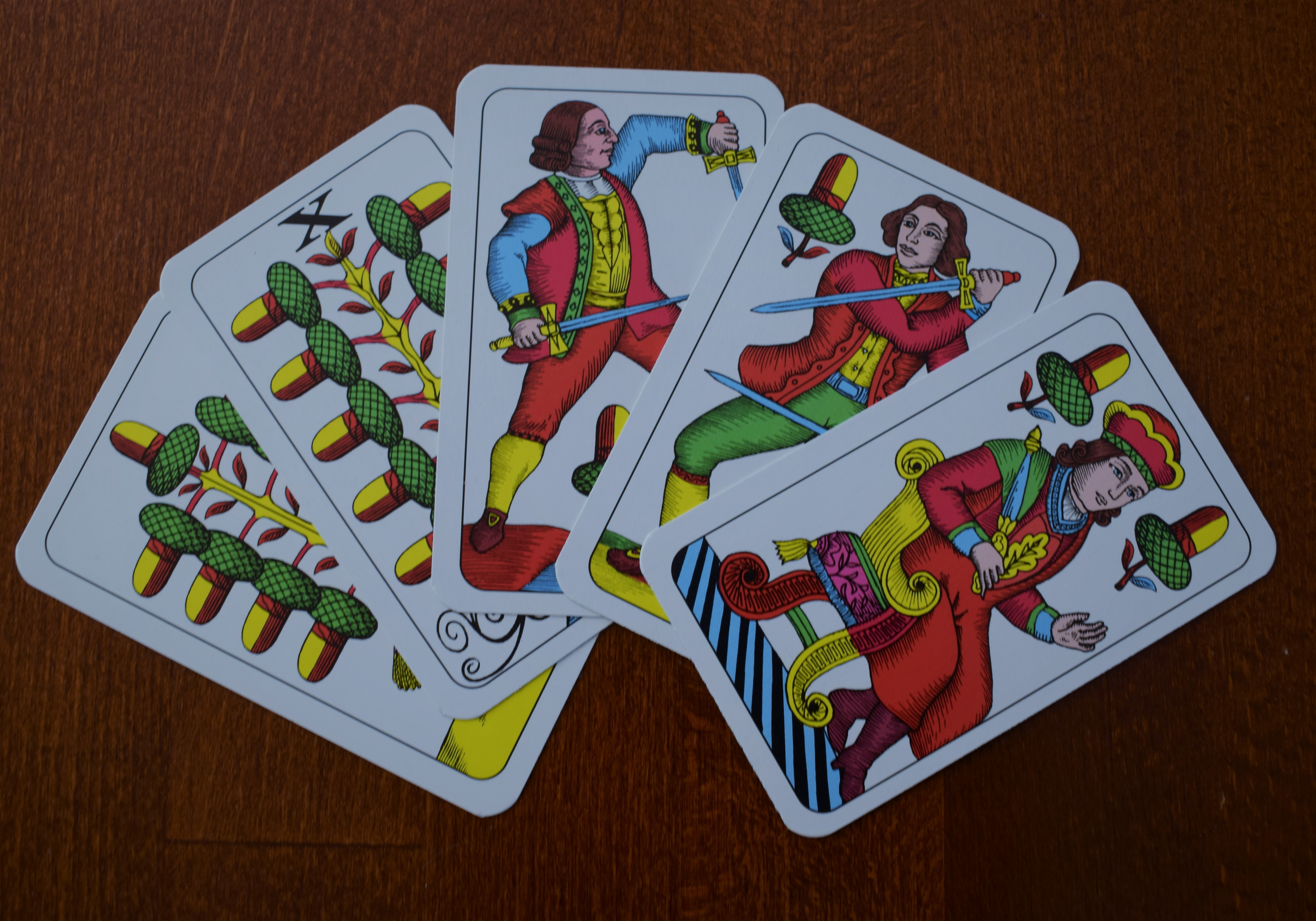 Sto při karetní hře Cenzr